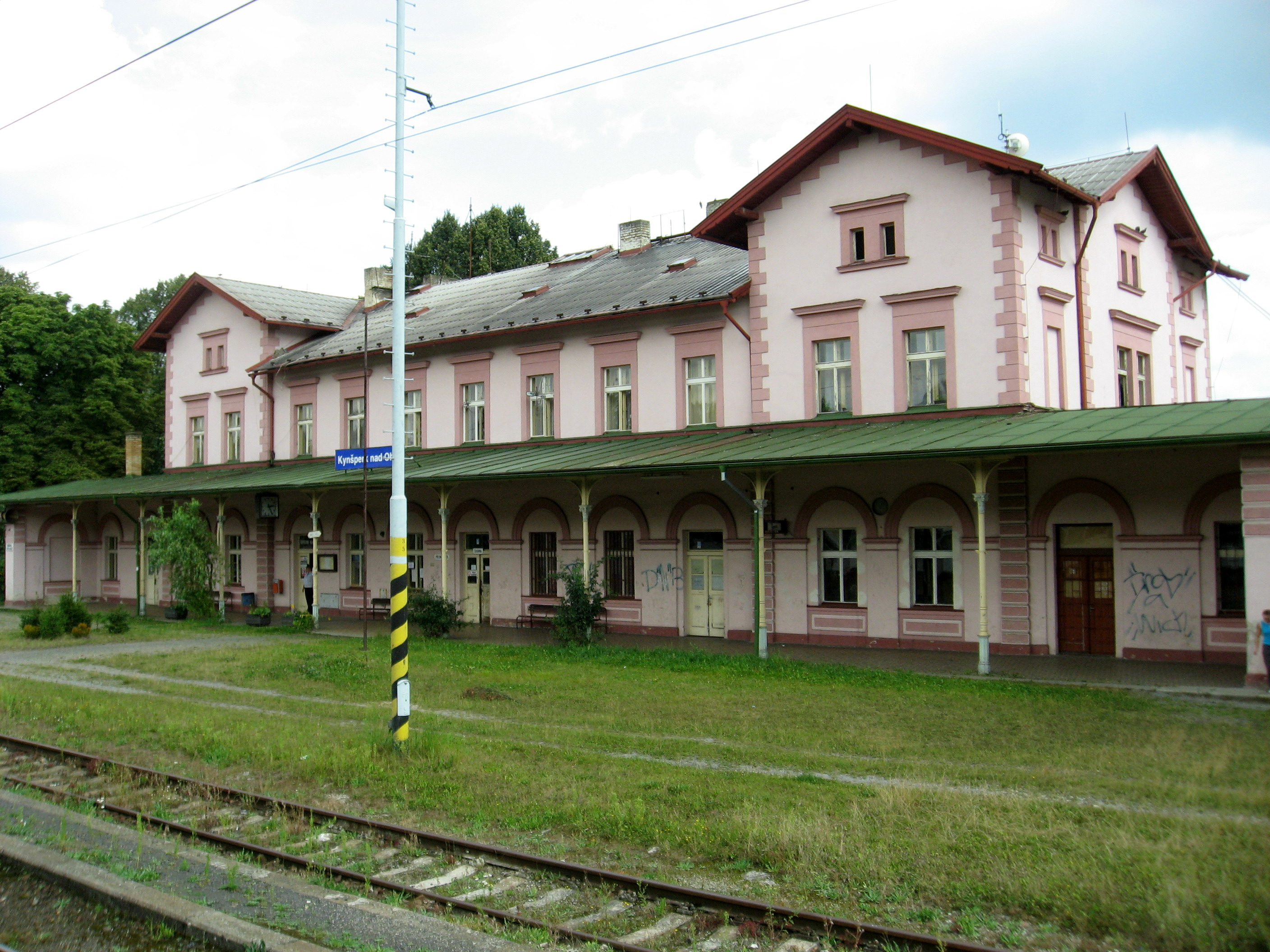 Kynšperk nad Ohří